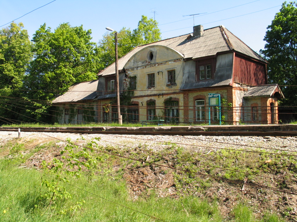 Kärevere jaamahoone, valmis 1920